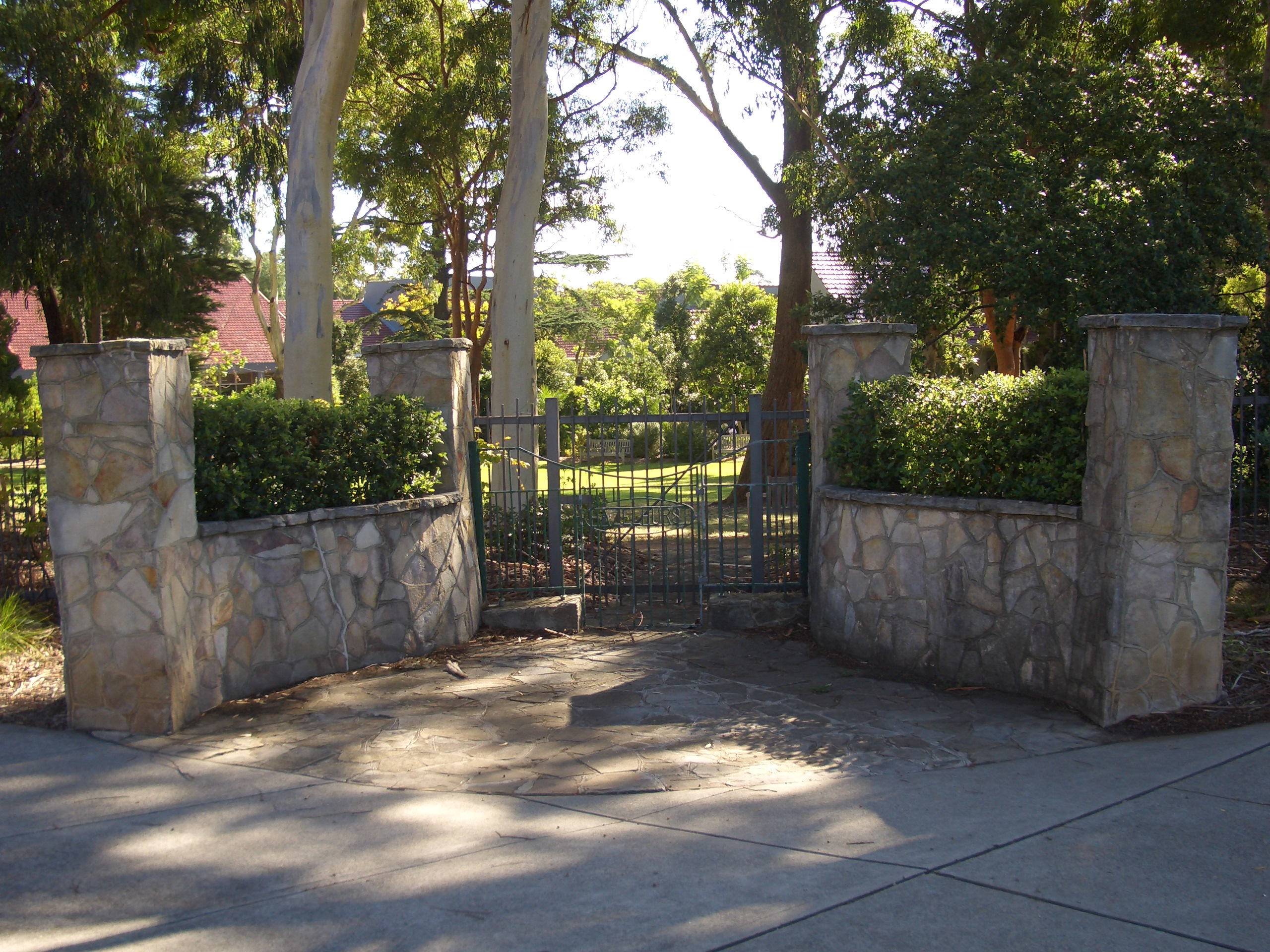 Hazelhurst Gallery